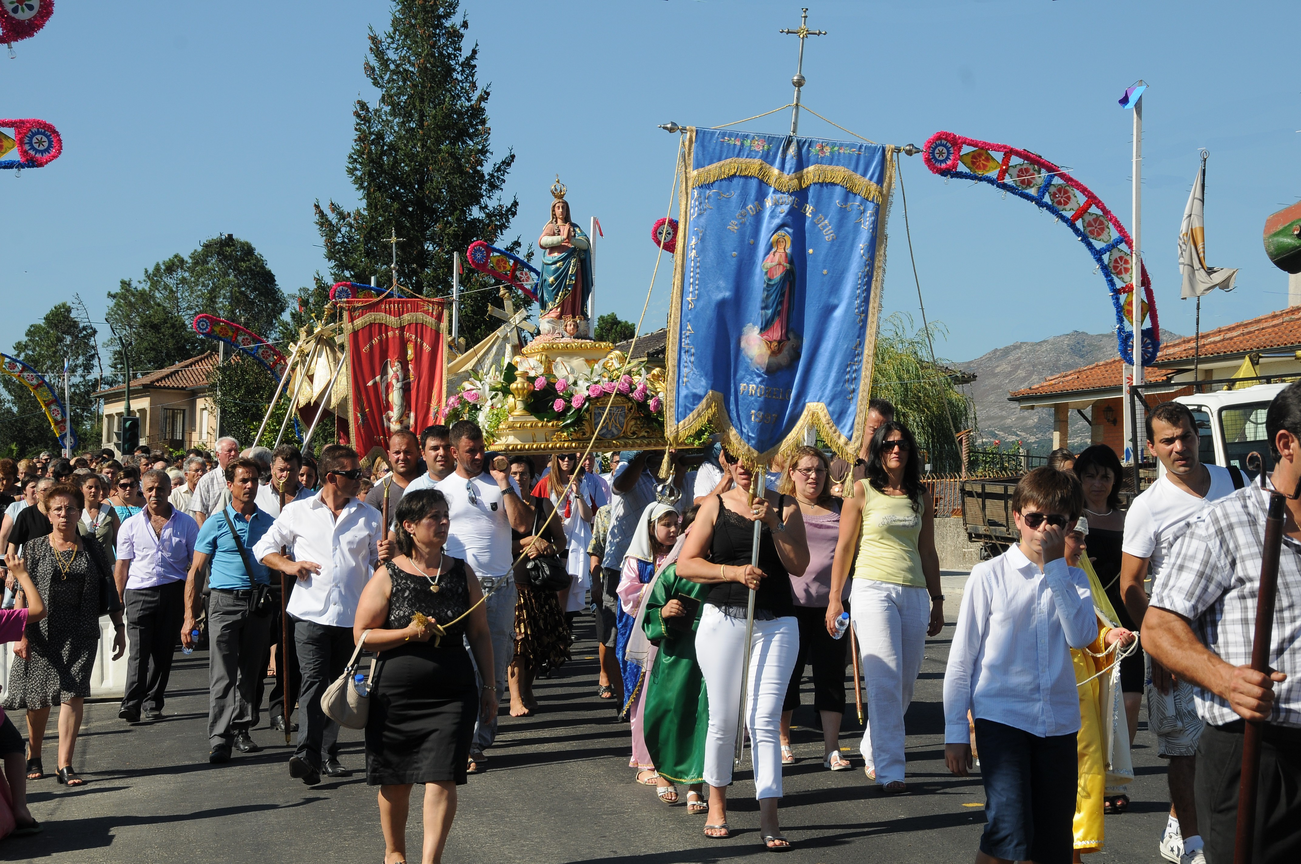 Procession in Prozelo, Arcos de Valdevez, Portugal